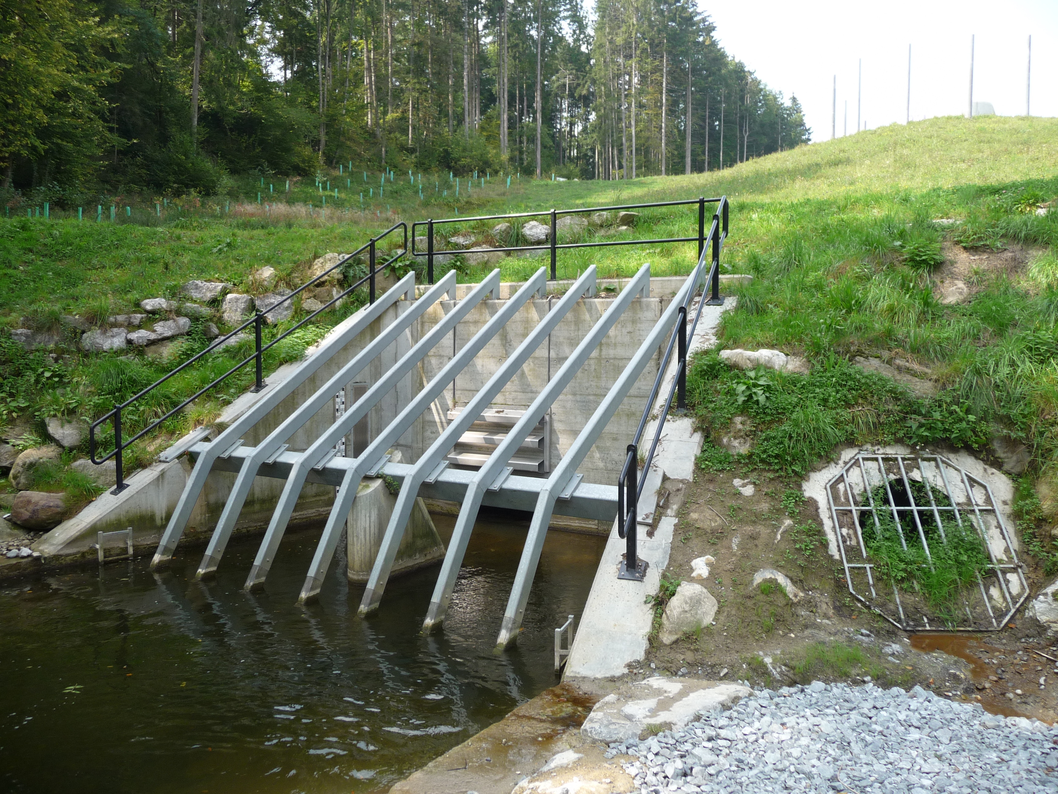 Hochwasserrückhaltebecken Jonenbach: Einlaufbauwerk für den Grundablass mit Rechen und Einlassdrosselung.